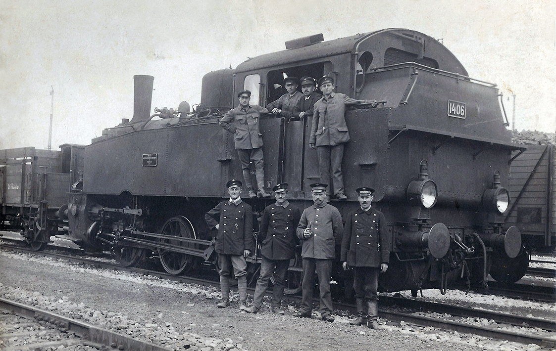 Markgröninger Bahnhofspersonal mit dem ersten Bahnhofsvorsteher Johannes Schöll vor der Tenderlokomotive Nr. 1406 der Gattung Gt 44.15 im Bahnhof Markgröningen. Die Lok ist eine württembergische T 6, die von der Reichsbahn 1925 in Dampflok 92 006 umgezeichnet wurde. 1917 wurde sie von der Maschinenfabrik Esslingen mit der Seriennummer 3773 hergestellt, 1947/48 an die Süddeutsche Eisenbahn-Gesellschaft verkauft und als SEG 392 umgezeichnet. Sie war zeitweise der Reinheim-Reichelsheimer Eisenbahn zugeteilt und ist im Europa-Park Rust zu besichtigen.